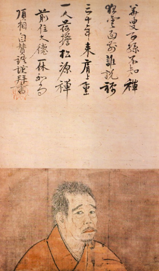 Portrait du moine Ikkyû par Shoto Bokusai, peintre japonais du XVe siècle. Cette œuvre à l'encre et couleurs légères sur papier, fait 26,3x43,6 centimètres. Elle est conservée au Musée national de Tokyo.